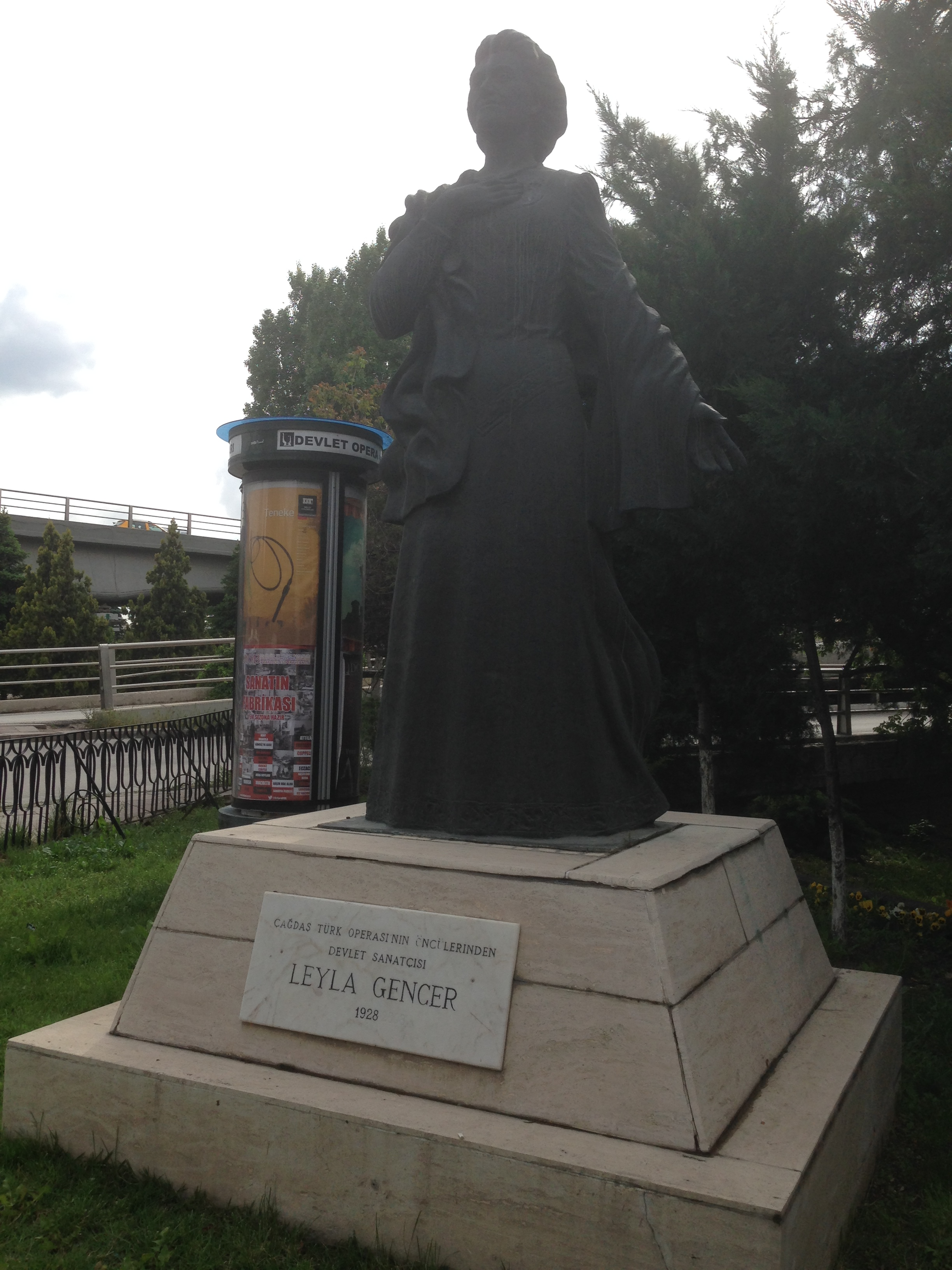 Leyla Gencer heykeli. Ulus, Ankara